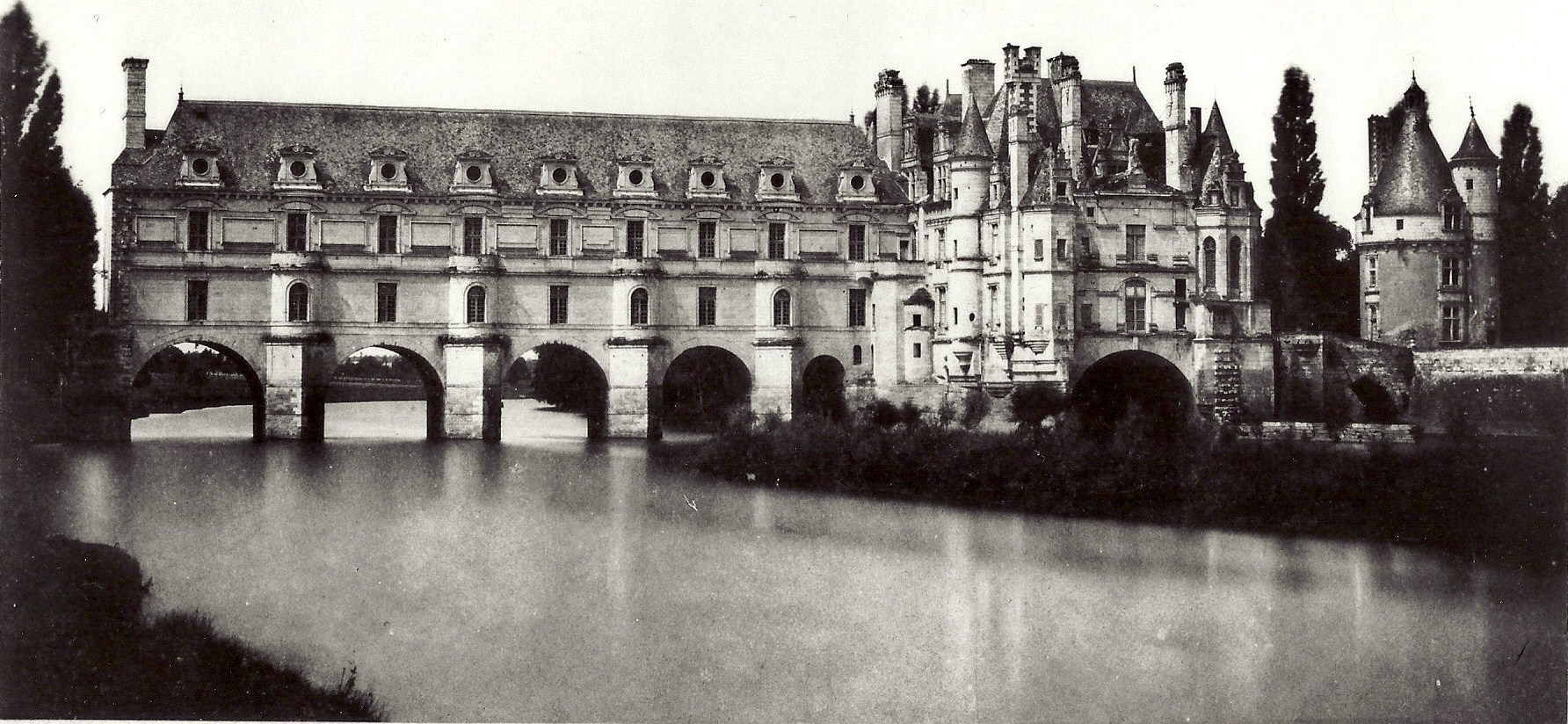 Château de Chenonceau, façade Est en 1851